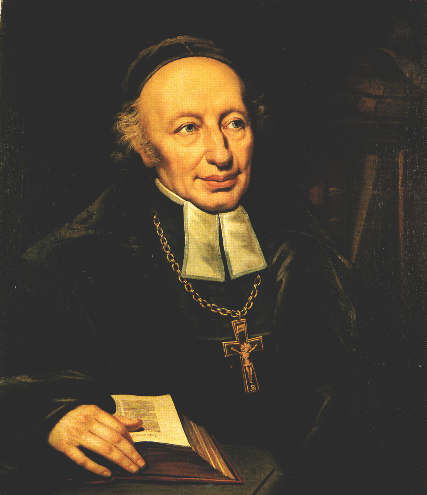 Fessler Ignác Aurél portréja